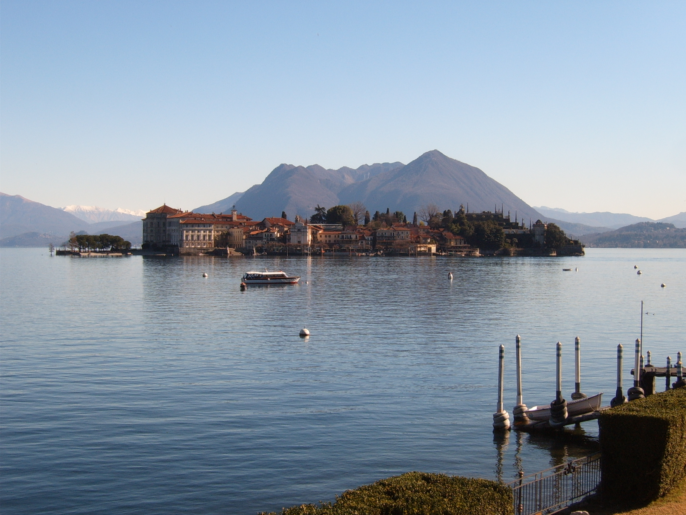 Isola Bella (Isole Borromee, Lago Maggiore, Italy)